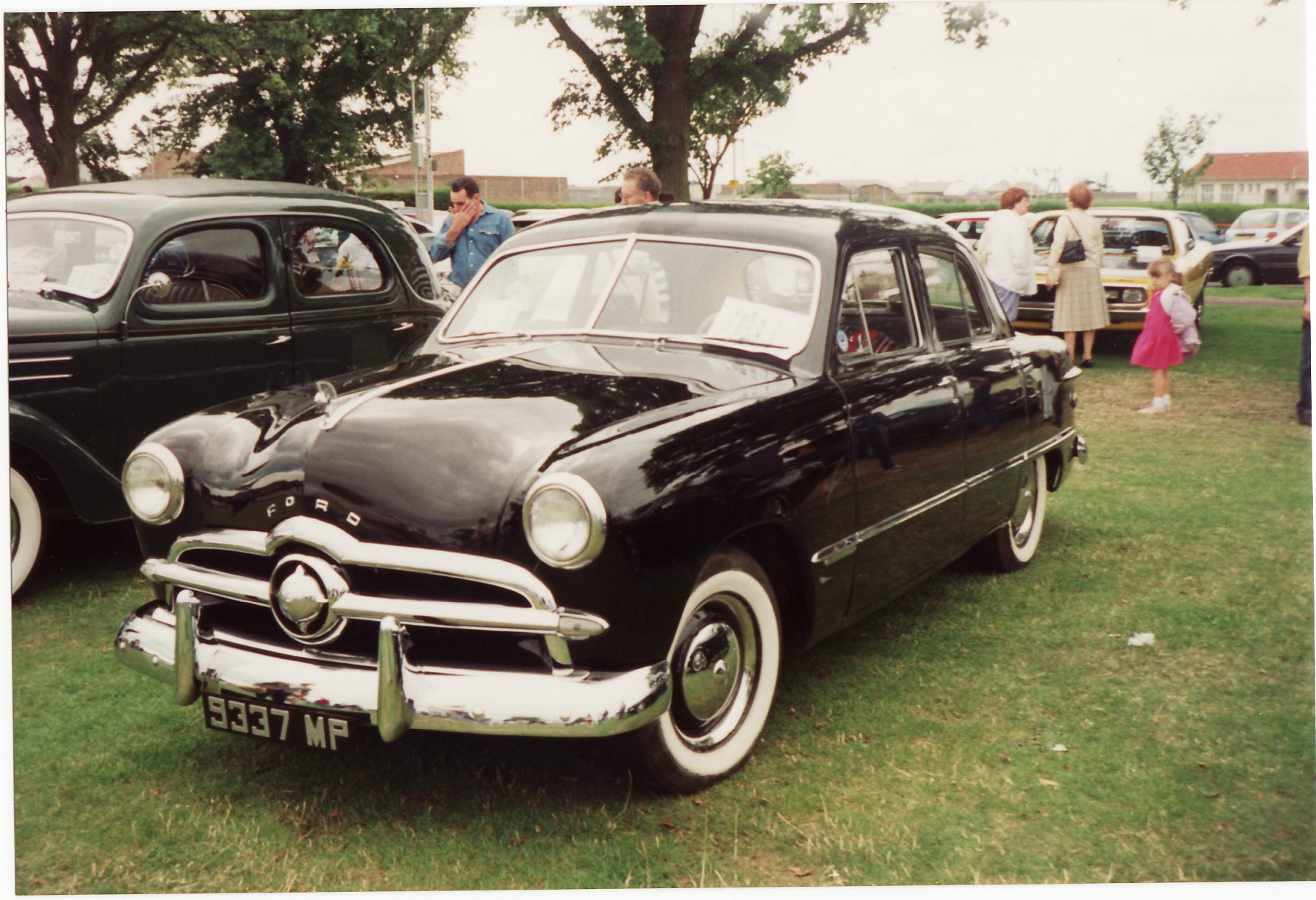 1949 Ford V8 Fordor Custom